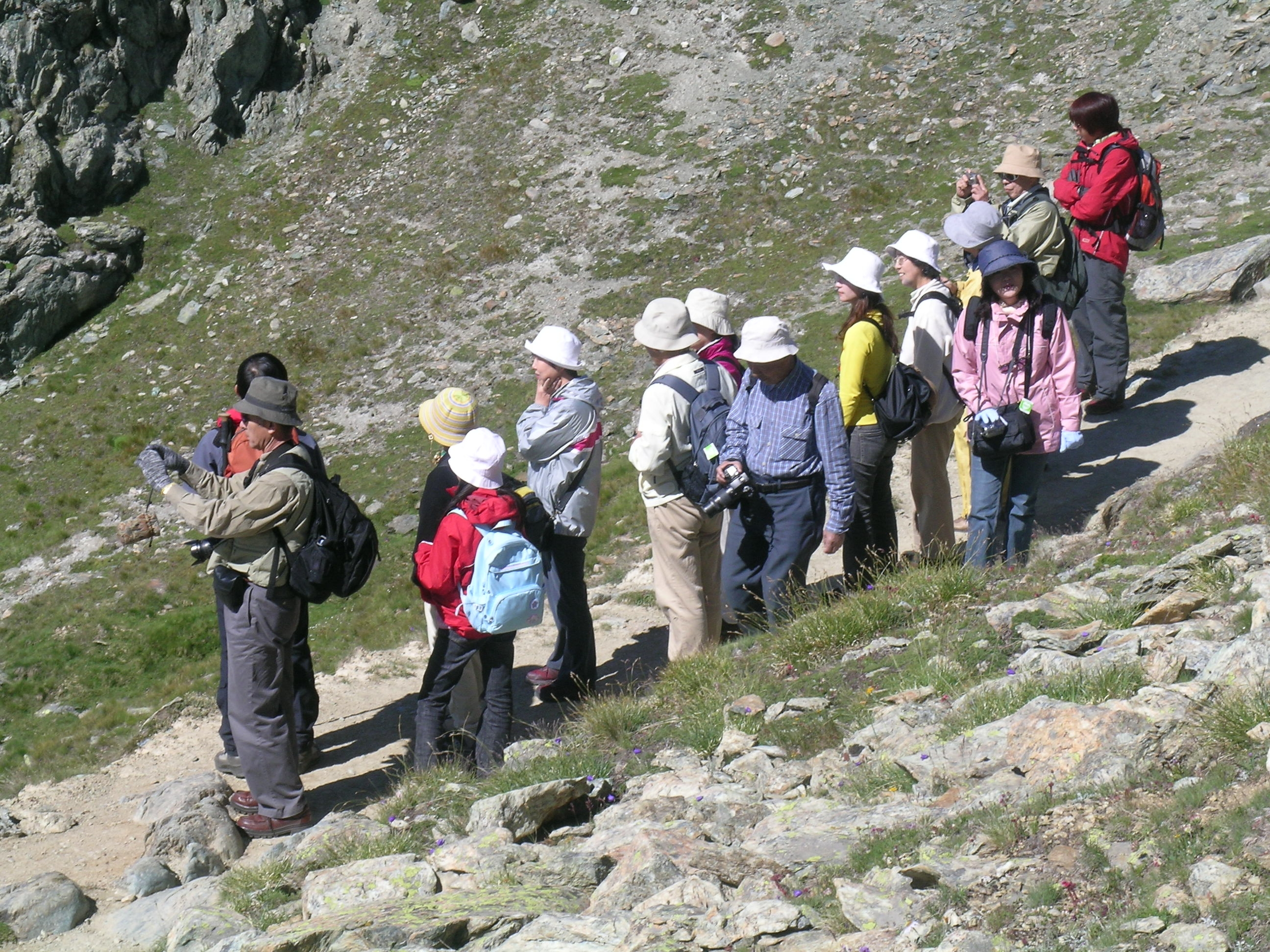 Japanese tourists at Riffelsee, Gornergrat, Zermatt, Kanton Wallis, Switzerland (2650 m.a.s)